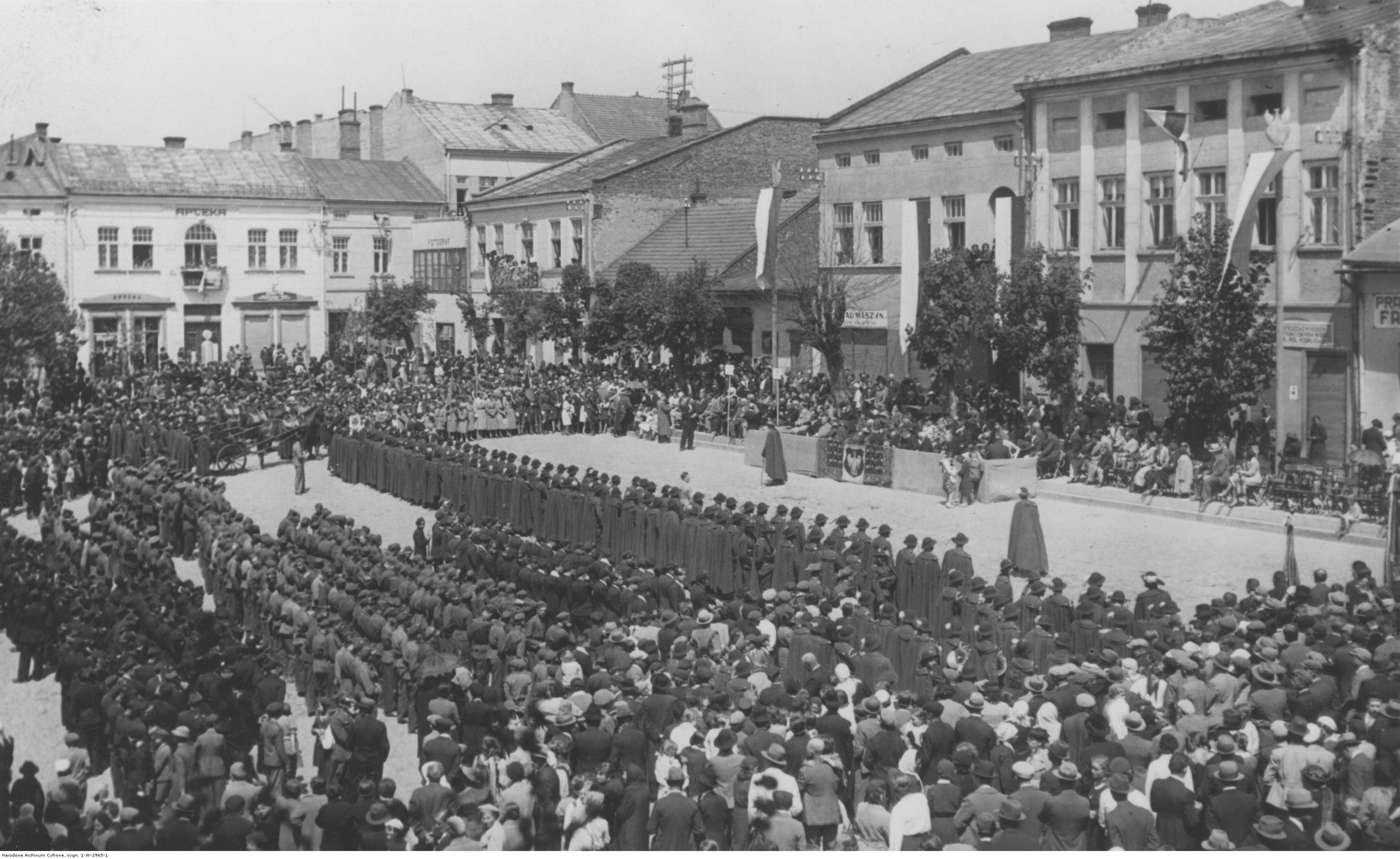 Przekazanie 1 Pułkowi Strzelców Podhalańskich trzech ciężkich karabinów maszynowych ufundowanych przez mieszkańców Gorlic. Posiedzenie Rady Miejskiej Gorlic na rynku podczas uroczystości przekazania broni podhalańczykom. Koncern Ilustrowany Kurier Codzienny - Archiwum Ilustracji. Sygnatura: 1-W-2965-1